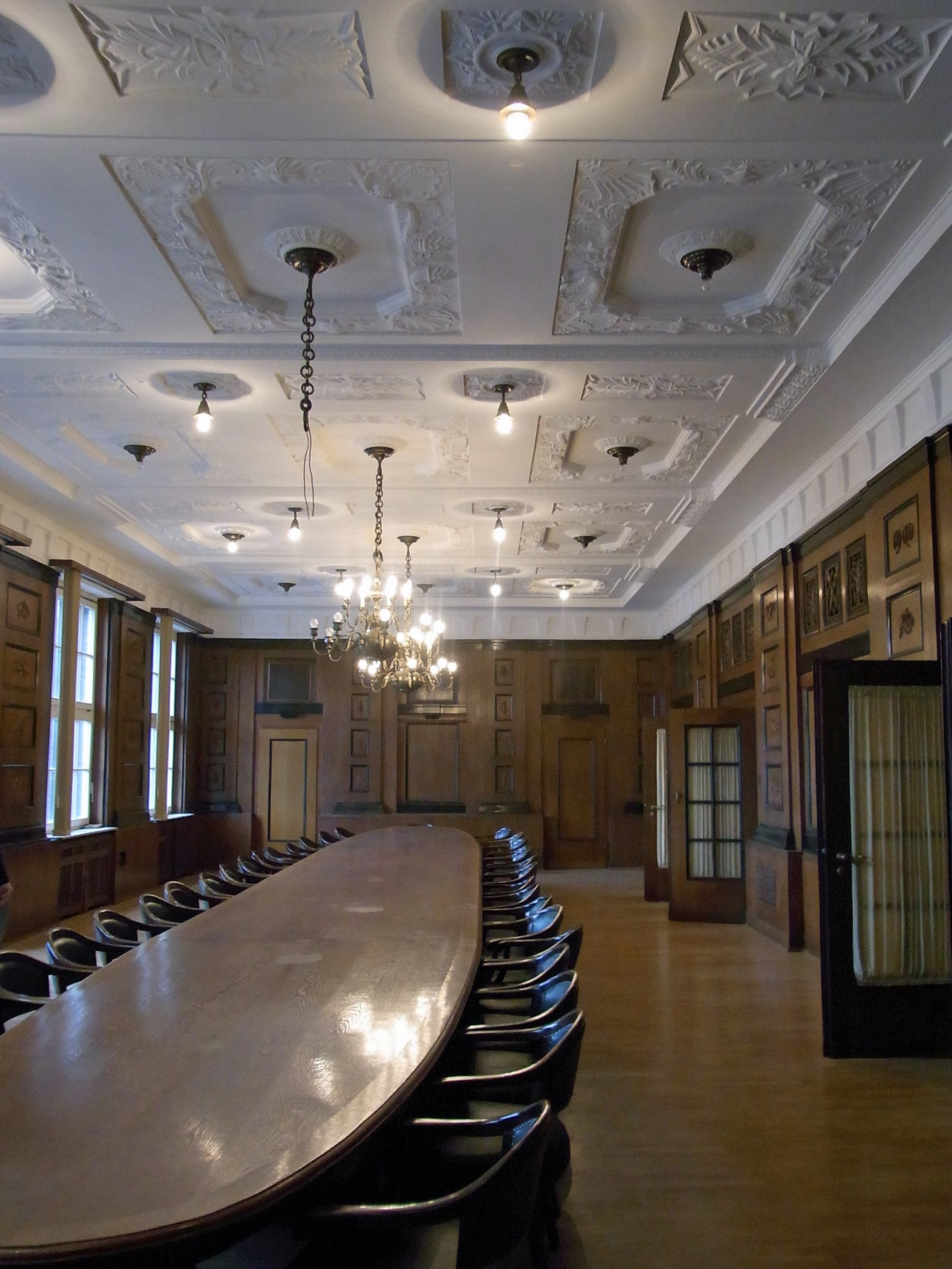 Verwaltungsgebäude der ehemaligen Union, AG für Bergbau, Eisen- und Stahl-Industrie: Großer SitzungssaalThis is a photograph of an architectural monument. 0327